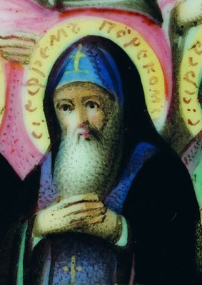 Прп. Ефрем перекомский. Фрагмент эмалевой иконы «Собор Новгородских святых». 1866 г. (СПГИАХМЗ)